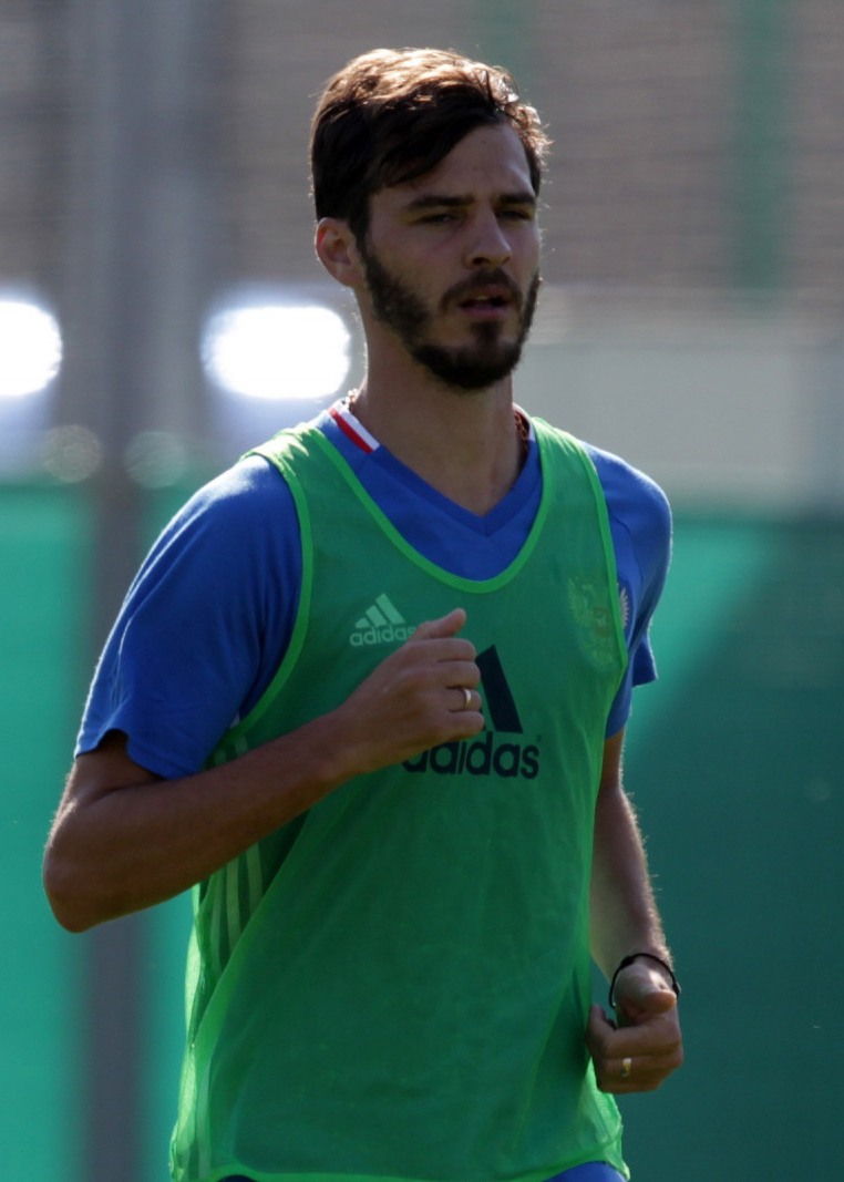 Тренировка сборной России